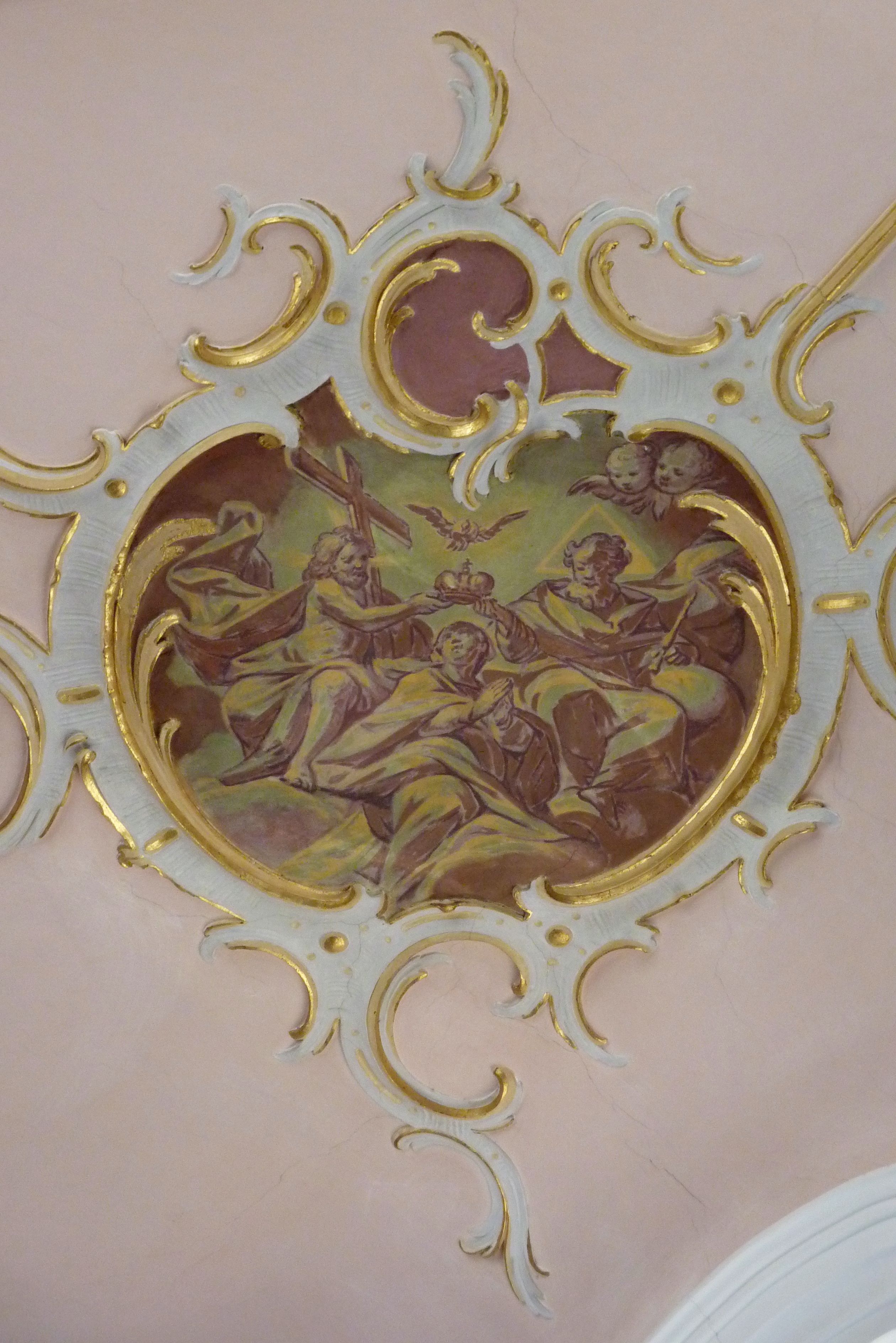 Katholische Pfarrkirche St. Ägidius in Schabringen, einem Ortsteil von Wittislingen im Landkreis Dillingen an der Donau (Bayern), Grisaille in den Kehlen der Langhausdecke, von Joseph Hartmann, von 1778. Darstellung: Krönung Mariens.